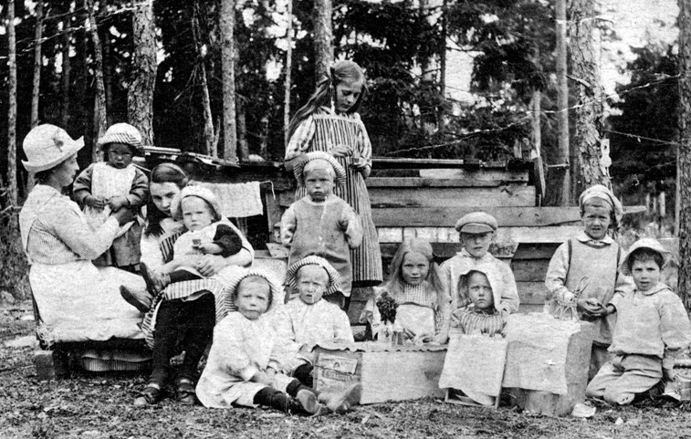 Sättra barnkoloni på Sättra gård, Adelsö